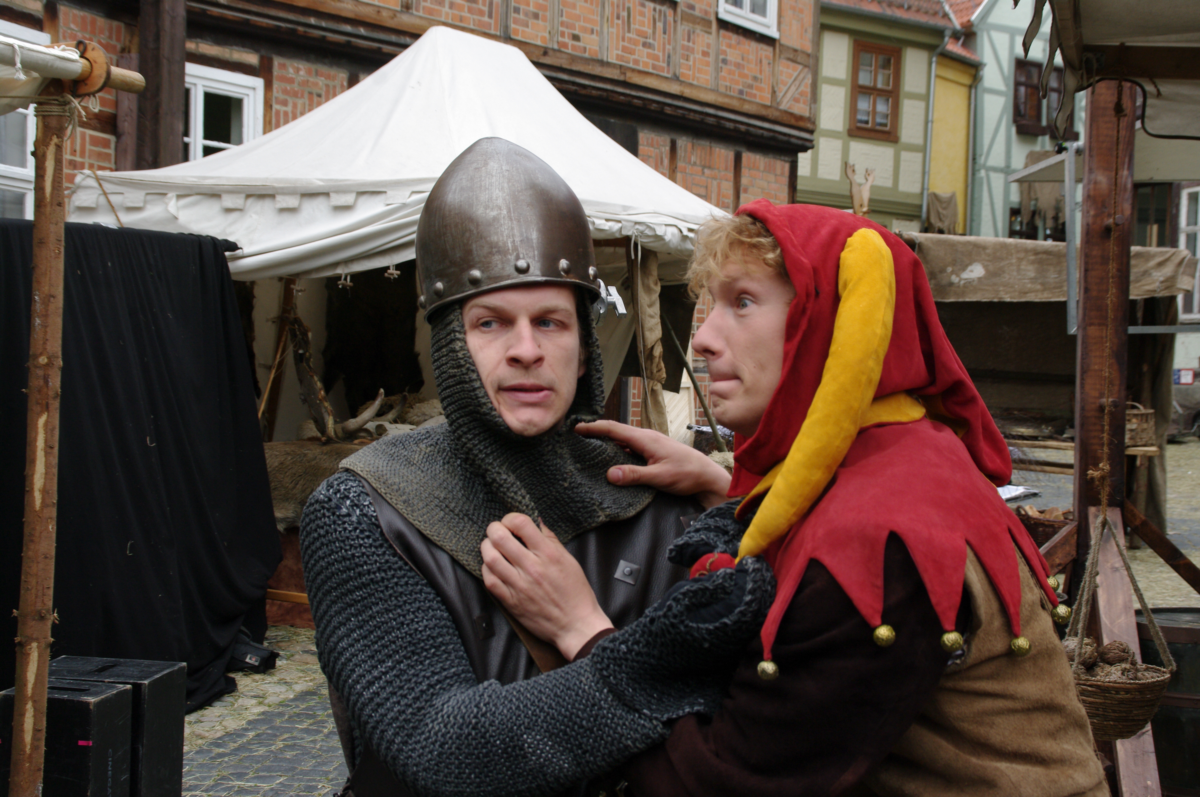 Dreharbeiten zu TILL EULENSPIEGEL 15. Mai 2014 in Quedlinburg